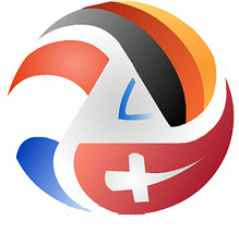 logo FTI